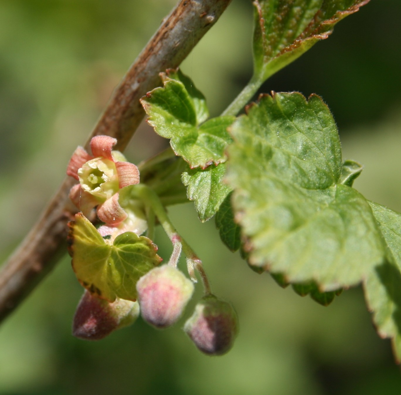 Mustaherukka (kukka), Ribes nigrum